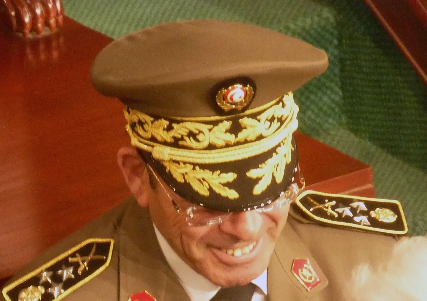 Général Rachid Ammar, chef d'état major de l'armée tunisienne lors de la cérémonie du 2ème anniversaire de la révolution tunisienne.